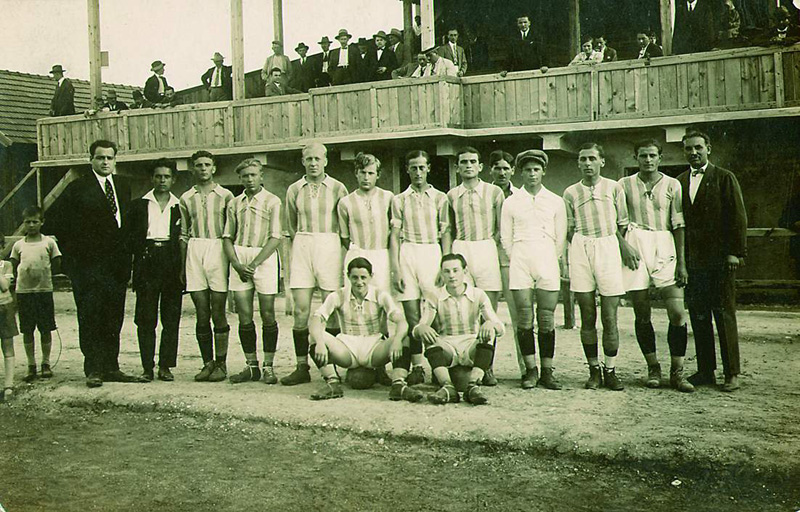 A Zte 1927-es csapata.